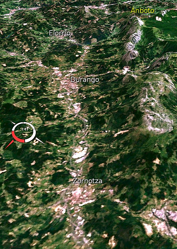 Durangaldeko ikuspegia, Ibaizabal ibaiaren arroa